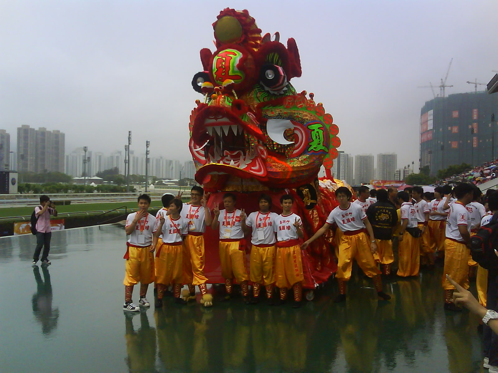 萬眾歡騰傳聖火大型社區慶祝活動